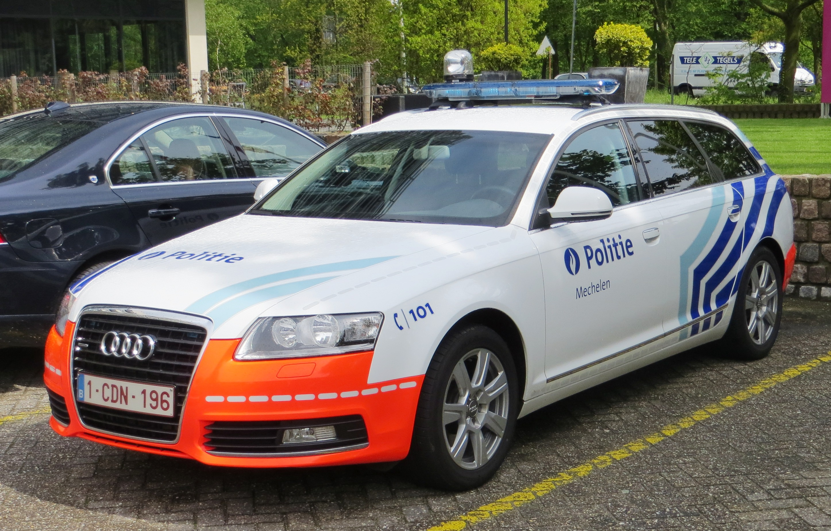 Belgische politie auto